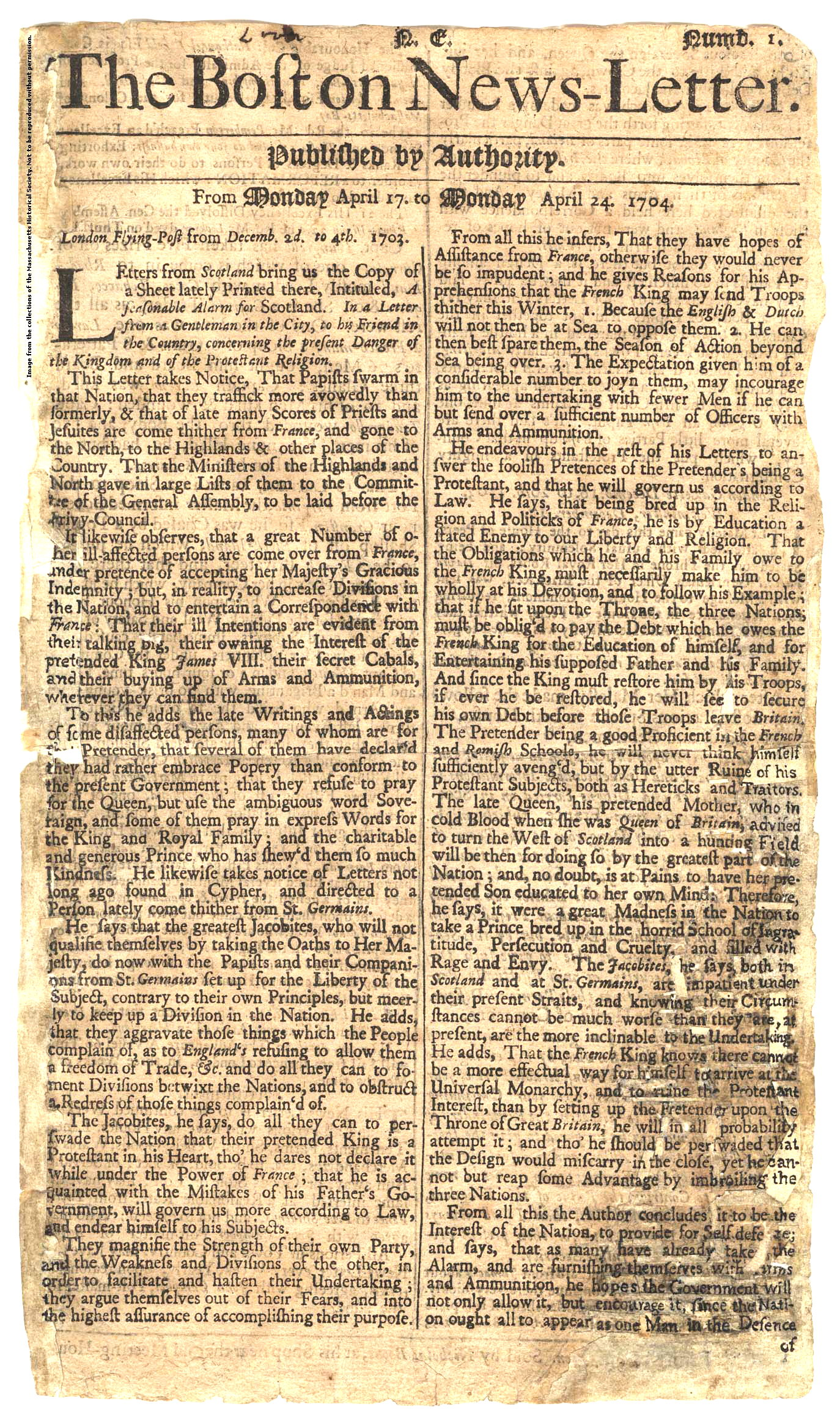 Der „Boston News Letter” für die Woche von 17. bis zum 24. April 1704, die zweitälteste amerikanische Zeitung